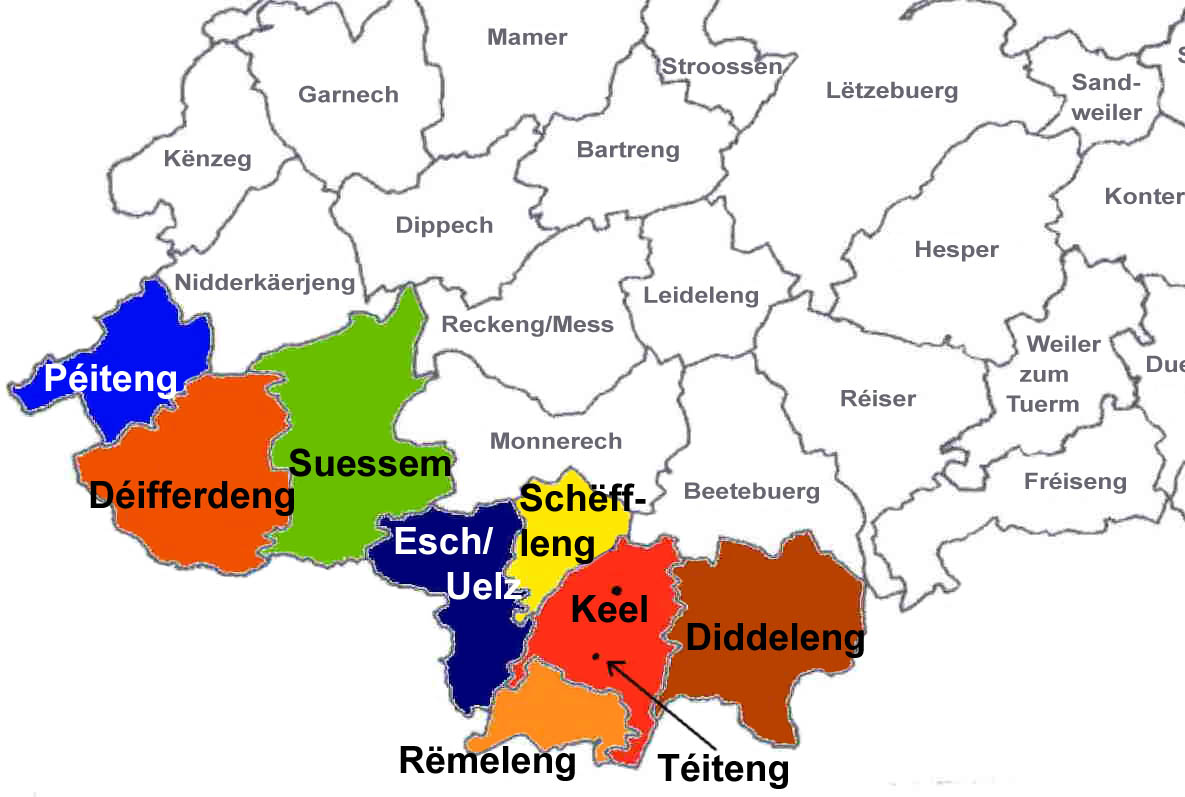 Lag vun Téiteng. Skizz: SITCK Iwwersetzung: Otets